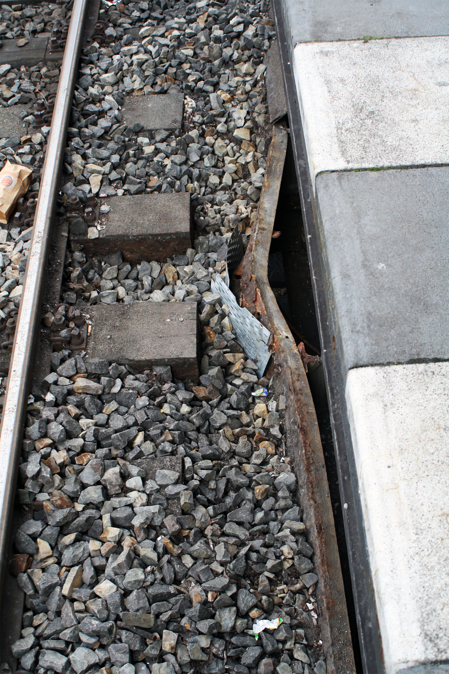 Brückenunfall 2010